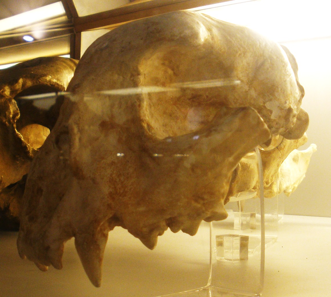 Fossil of Acinonyx pardinensis, an extinct mammal - Took the picture at Museo Paleontologico di Firenze